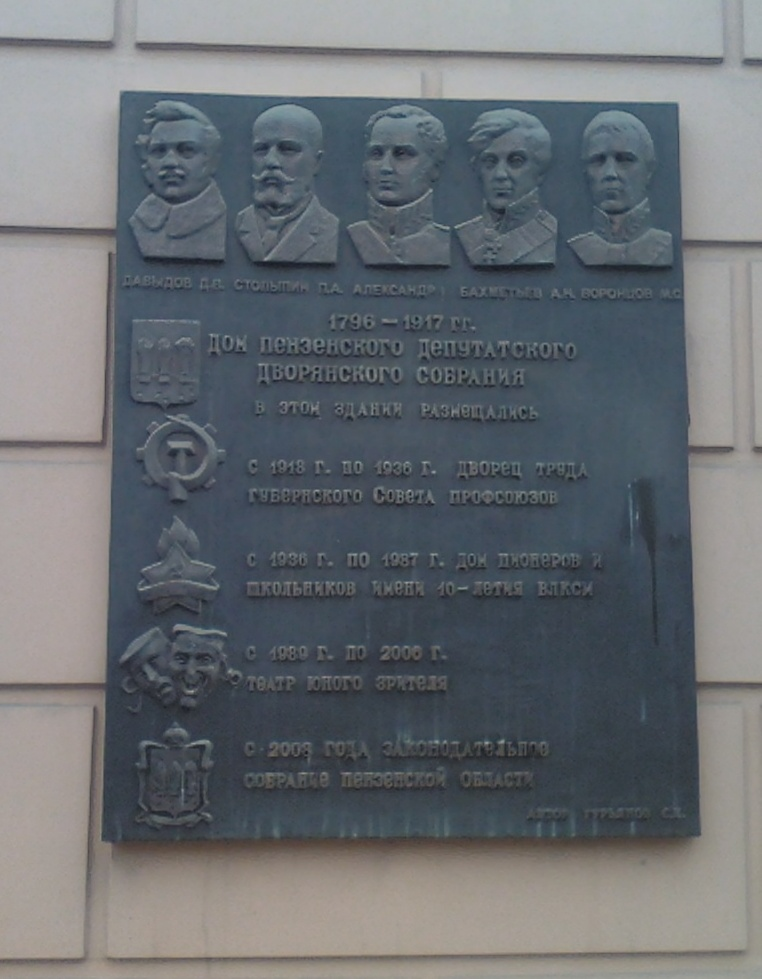 Пенза. Законодательное собрание. Мемориальная доска